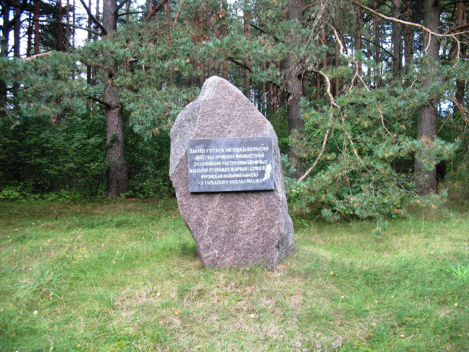 Памятник евреям города Мядель Минской области, убитым в сентябре 1942 года. Расположен около трассы Минск-Нарочь – не доезжая до Мяделя 1,5 км справа находится камень (на данной фотографии) с указанием на мемориал, а далее – сам мемориал. Установлен израильтянами – выходцами из Мяделя, потомками убитых, в 1993 году. На основном памятнике три камня на иврите – один с текстом, кто поставил и почему, а два боковых – с именами погибших.